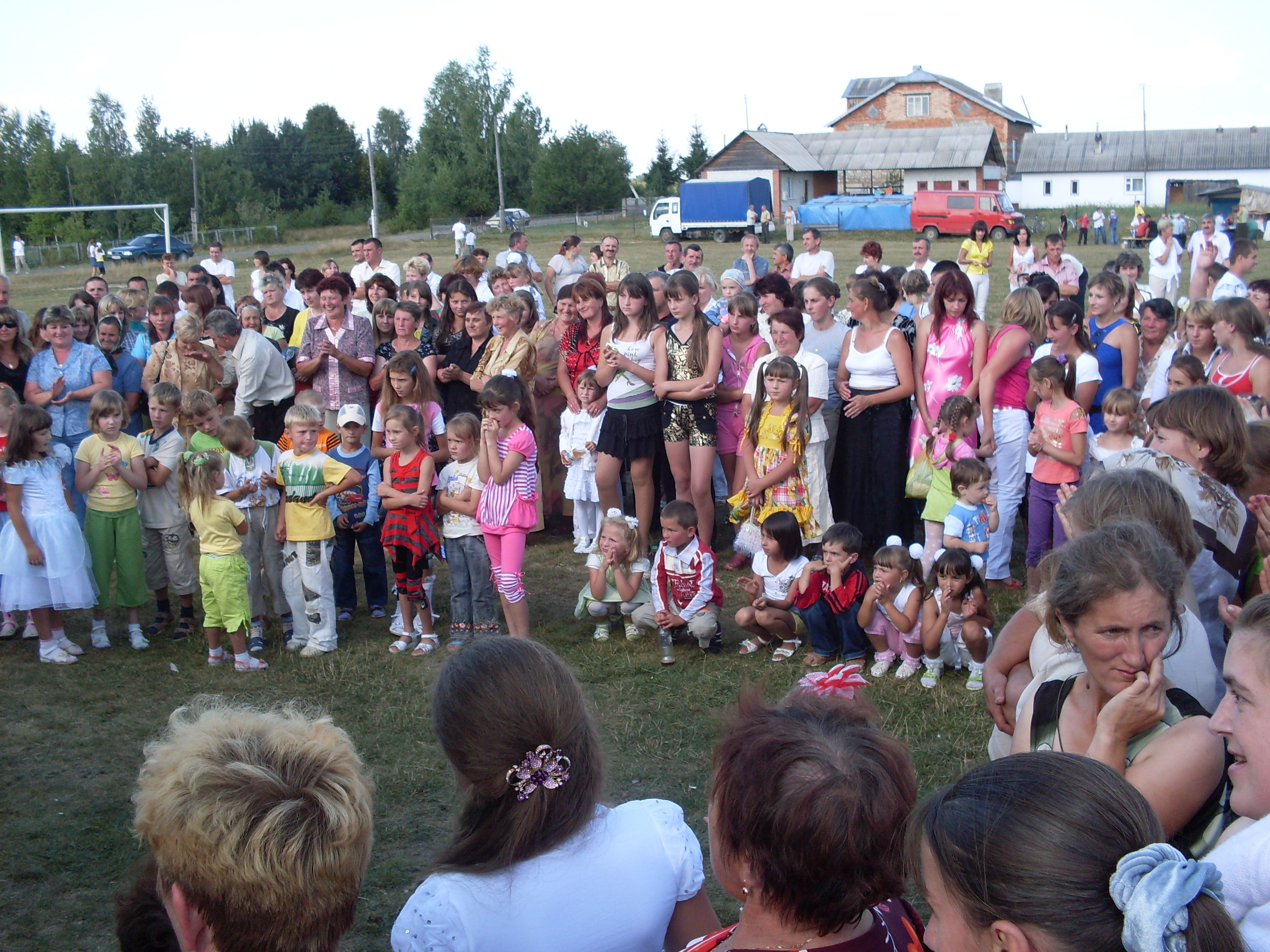 Lдень села 189.jpg: святкування Дня села у селі Вільхівка на Рожнятинщині (Івано-Франківська область)